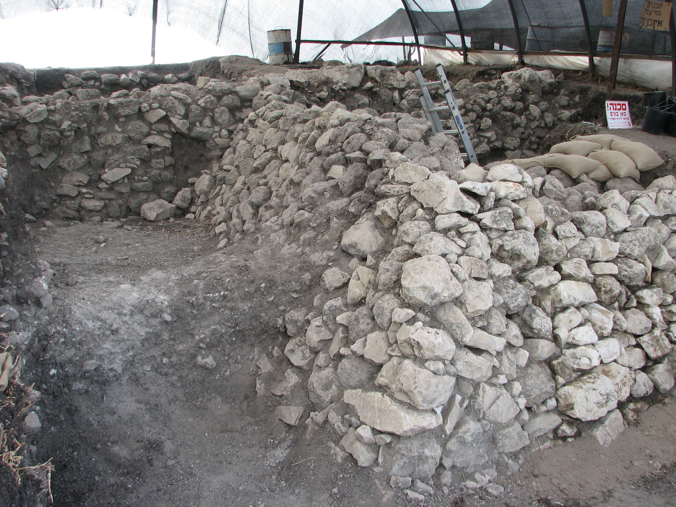 Tell Esur תל-אסור, שנמצא בפתחו המערבי של נחל עירון. התל נחפר על ידי הארכאלוג אדם זרטל בשנים 2001-2003 וכן על ידי שי בר מאוניברסיטת חיפה בשנת 2010 Glacis חלקלקה מתקופת הברונזה התיכונה שנחשפה בחפירות 2001-2003